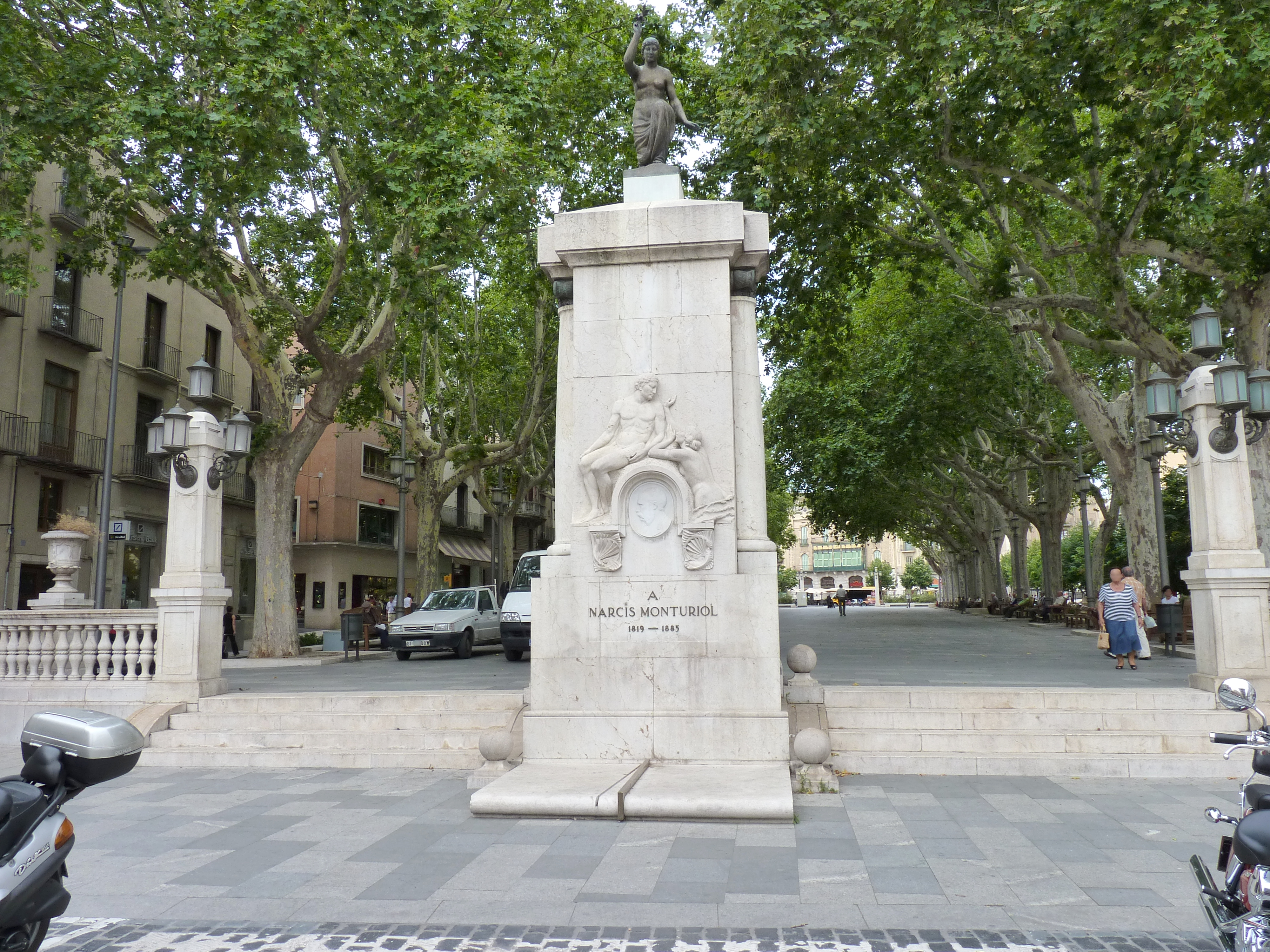 Plaça de la Palmera et Monument à Narcís Monturiol, Figuères (Haut-Ampurdan, Gérone, Catalogne, Espagne)